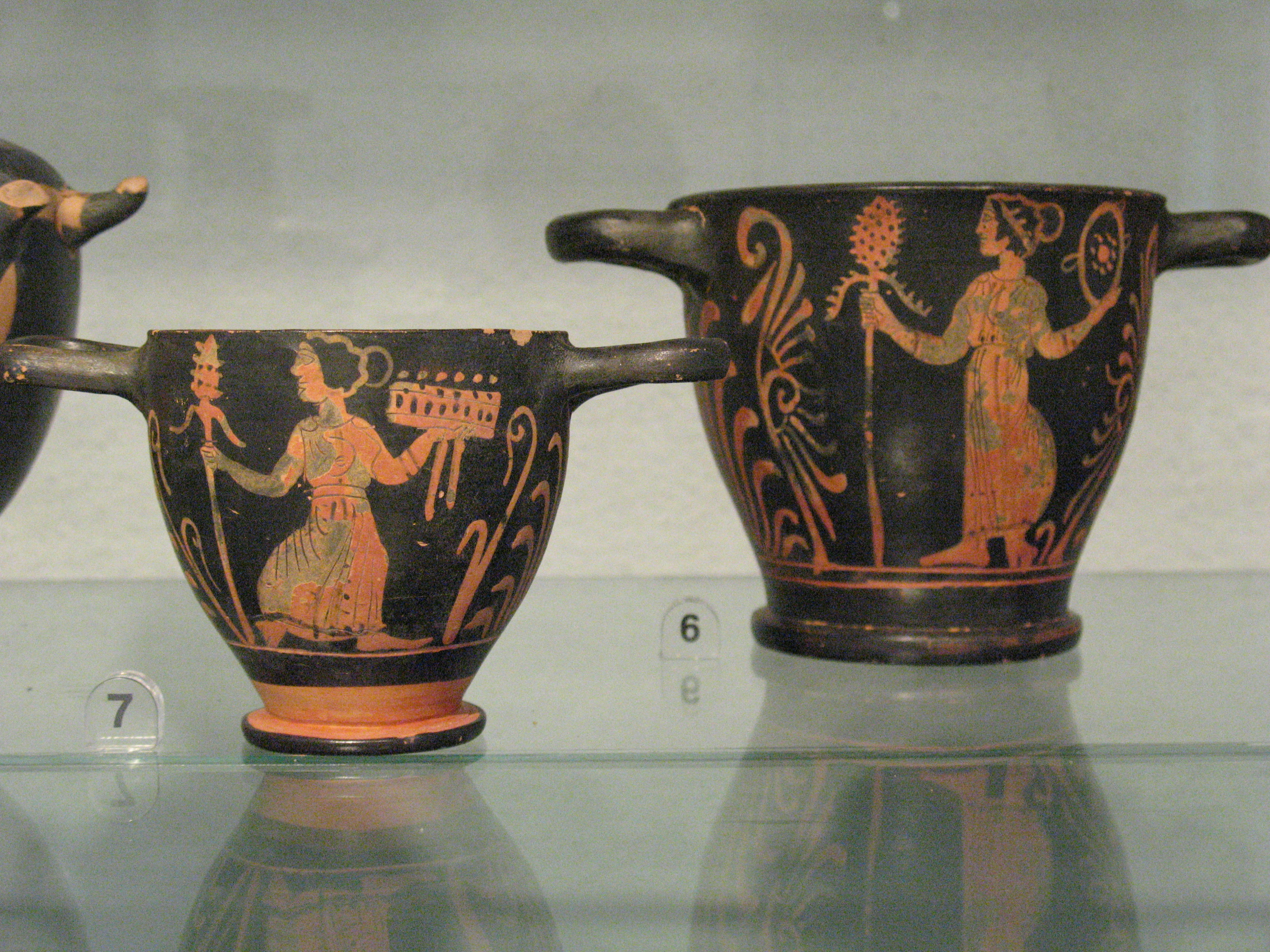 Deux skyphoi à peinture superposée attribués au Peintre de Sydney: ménades